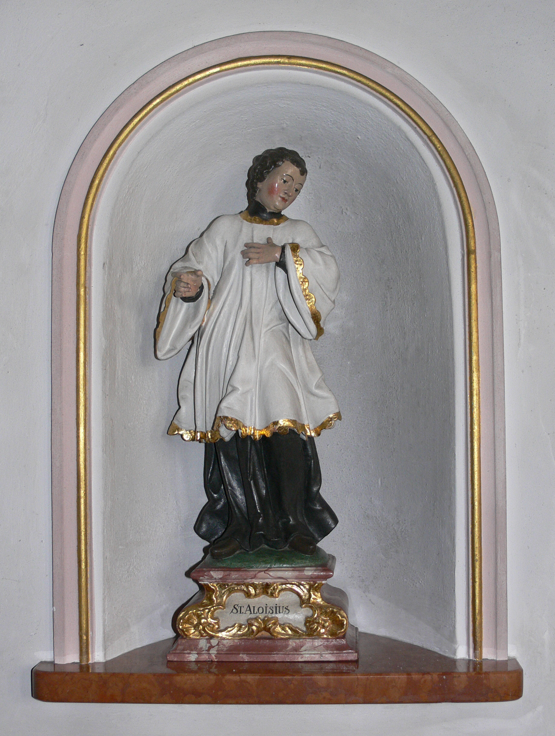 Pfarrkirche Mariä Geburt, (Horgenzell-)Hasenweiler Statue des hl. Aloysius Gonzaga